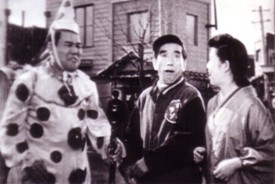 『のど自慢狂時代』、東横映画、1949年